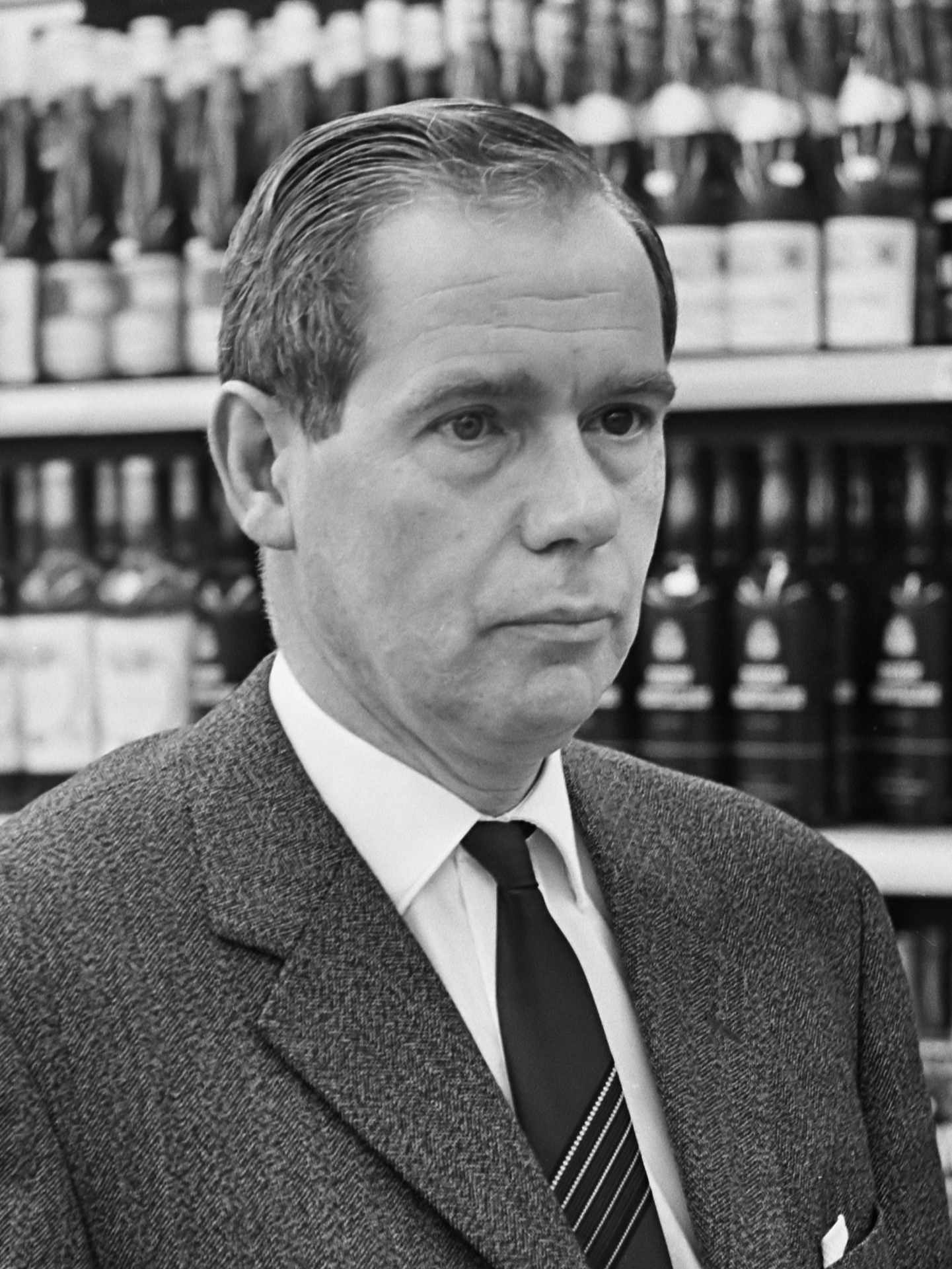 Jac Hermans (kruidenier) 23 januari 1967